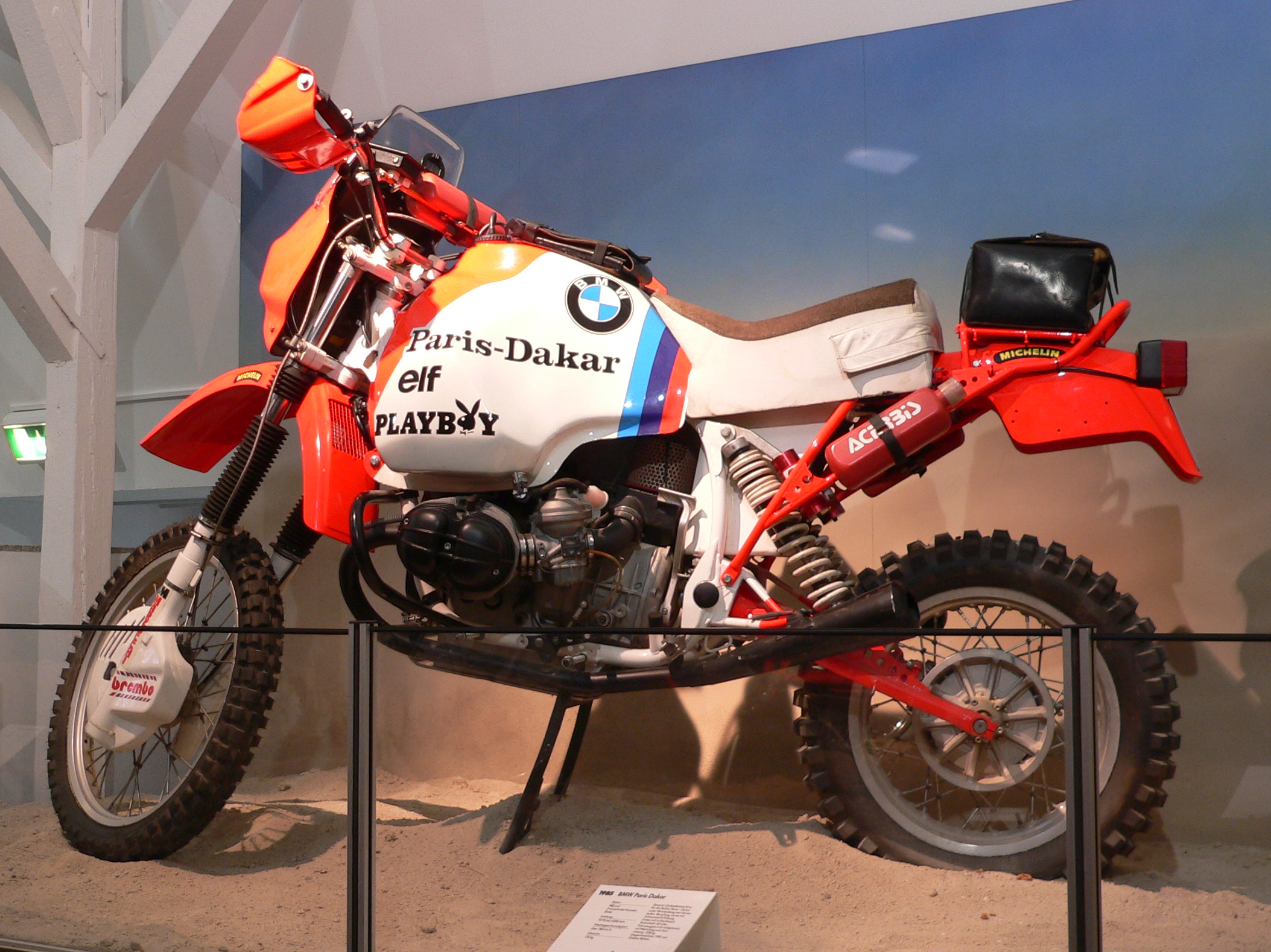 Motorbike "BMW" of G. Rahier (Winner of the Rallye Dakar 1985) at the Deutsches Zweirad- und NSU-Museum